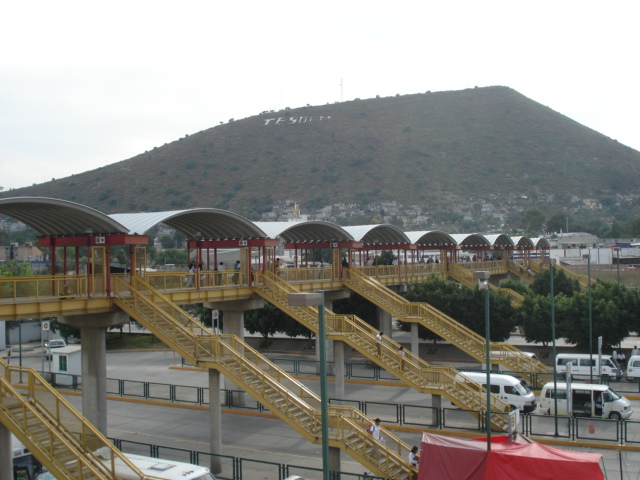 Fotografía que muestra una perspectiva de los accesos elevados, para el Paradero de la Estación LA PAZ-Línea A, del STC-METRO. Se ubica en el Municipio del mismo nombre, en el Oriente del Estado de México. Las Vialidades cercanas son la Avenida Puebla, Vías Férreas del Sur y la Carretera Federal México-Puebla. En este sitio se piensa ubicar un CETRAM, para el Tren Suburbano